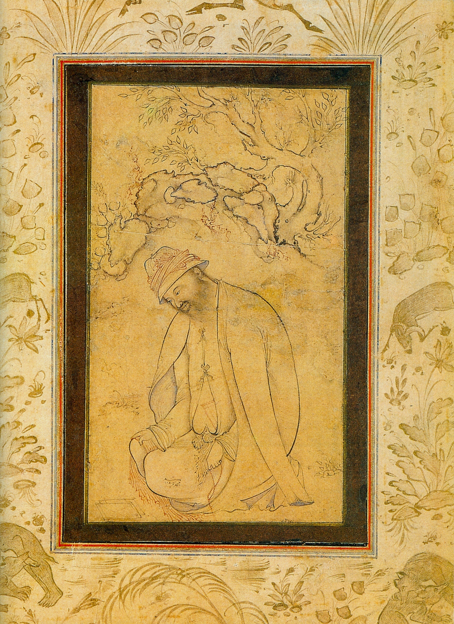 Muhammad_Yusuf_Дервиш_с_четками_ок.1650_Эрмитаж